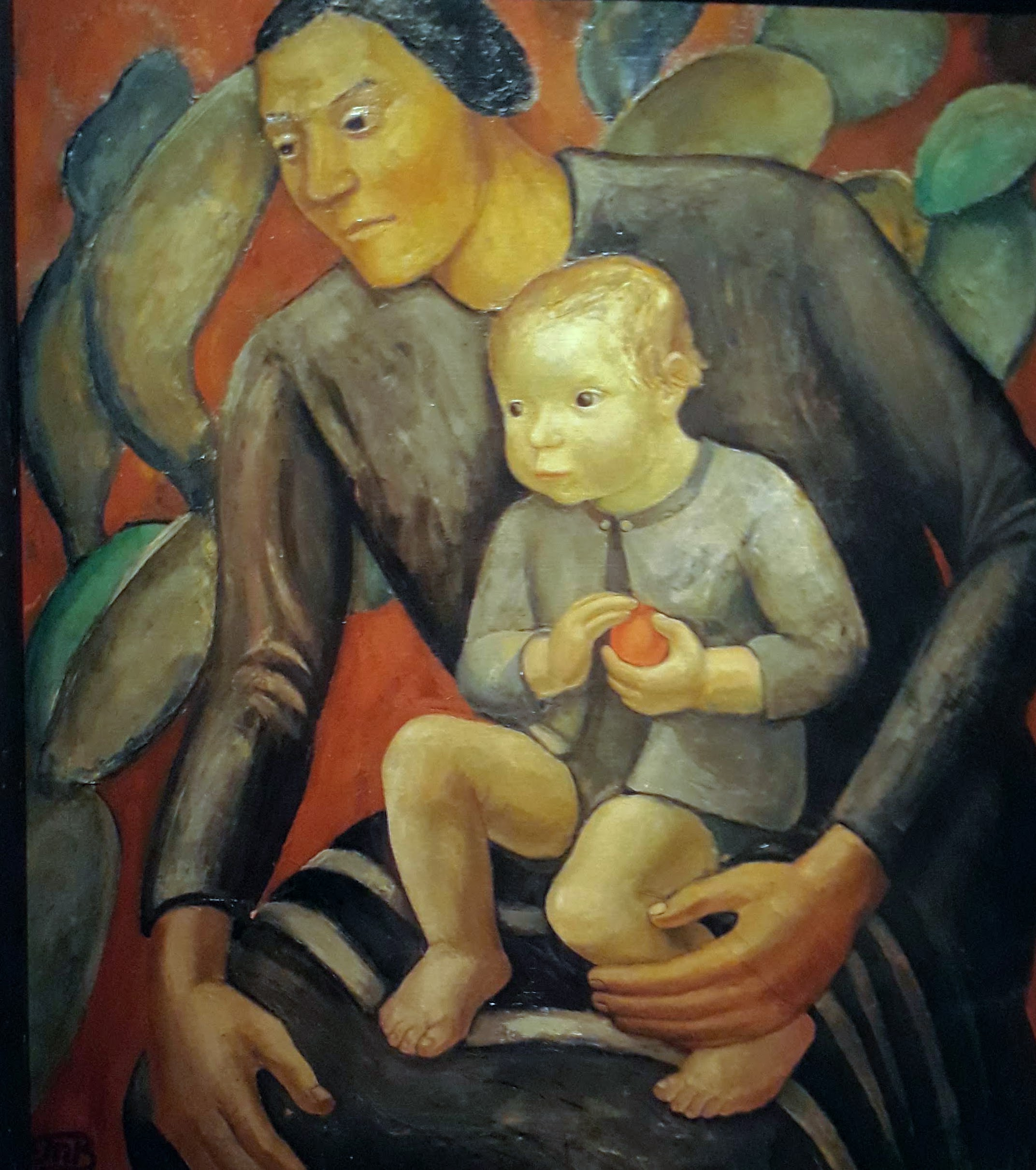 Oliemaleri af en Mor med barn på skødet. Barnet holder en rød bold.